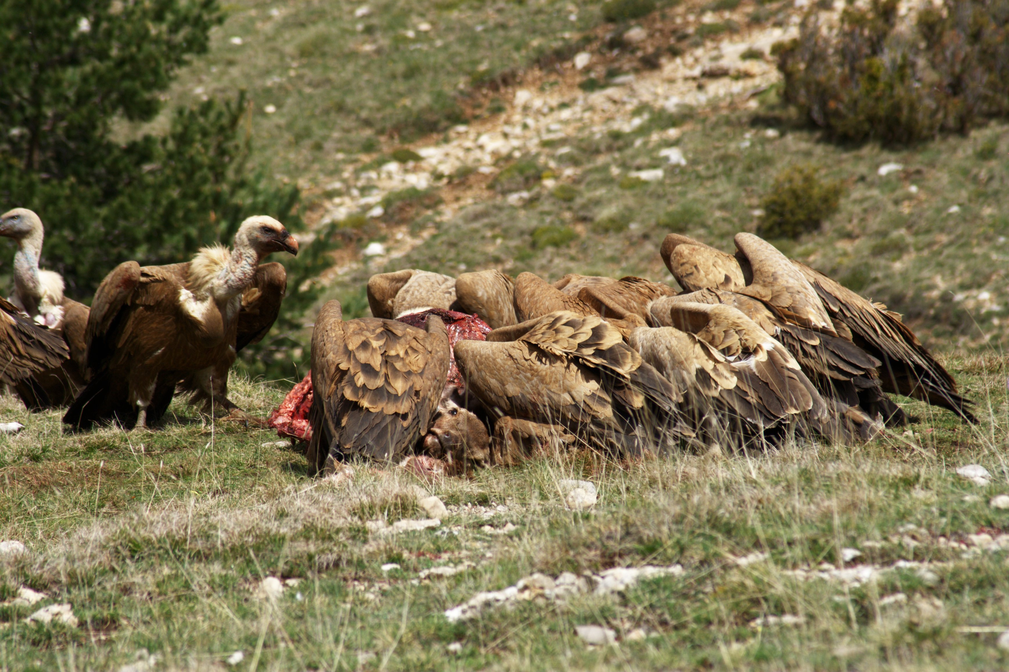 Un grupo de buitres leonados Gyps fulvus desciende del cielo y aterriza sobre una cierva muerta, en el prepirineo de Lérida (Cataluña). Camuflado a escasos 10 metros de la escena, inmóvil, con un chubasquero verde tipo chompo, manga de la chaqueta remangada, trípode situado entre ramas de un pequeño pino en crecimiento, teleobjetivo montado encima, manos situadas una en el disparador y otra en el objetivo y 15 minutos inolvidables. Colocado. Sin moverme. Con el chompo y la capucha puesta. Sin buitres. Bastó sólo 1 minuto para que se observaba su aproximación por el movimiento que sus sombras ejercían sobre el suelo, de un lado hacia el otro. Al principio solo una, de un tamaño pequeño (aún estaba lejos), pero en apenas 30 segundos, se empezaron a ver cada vez un mayor número de sombras, cada vez más grandes. Se acercaban a las ciervas muertas. Además, cuanto más cerca estaban, se escuchaban con mayor fuerza sus aleteos portentosos, casi sintiéndolos. No pude cuantificar el número de buitres que estaban posados... El movimiento de mis ojos (que no de mi cabeza) observando las sombras, y escuchar el sonido de sus aleteos, hicieron posible que tomara esta secuencia de imágenes. ¡Inolvidable! ¡Espectacular!